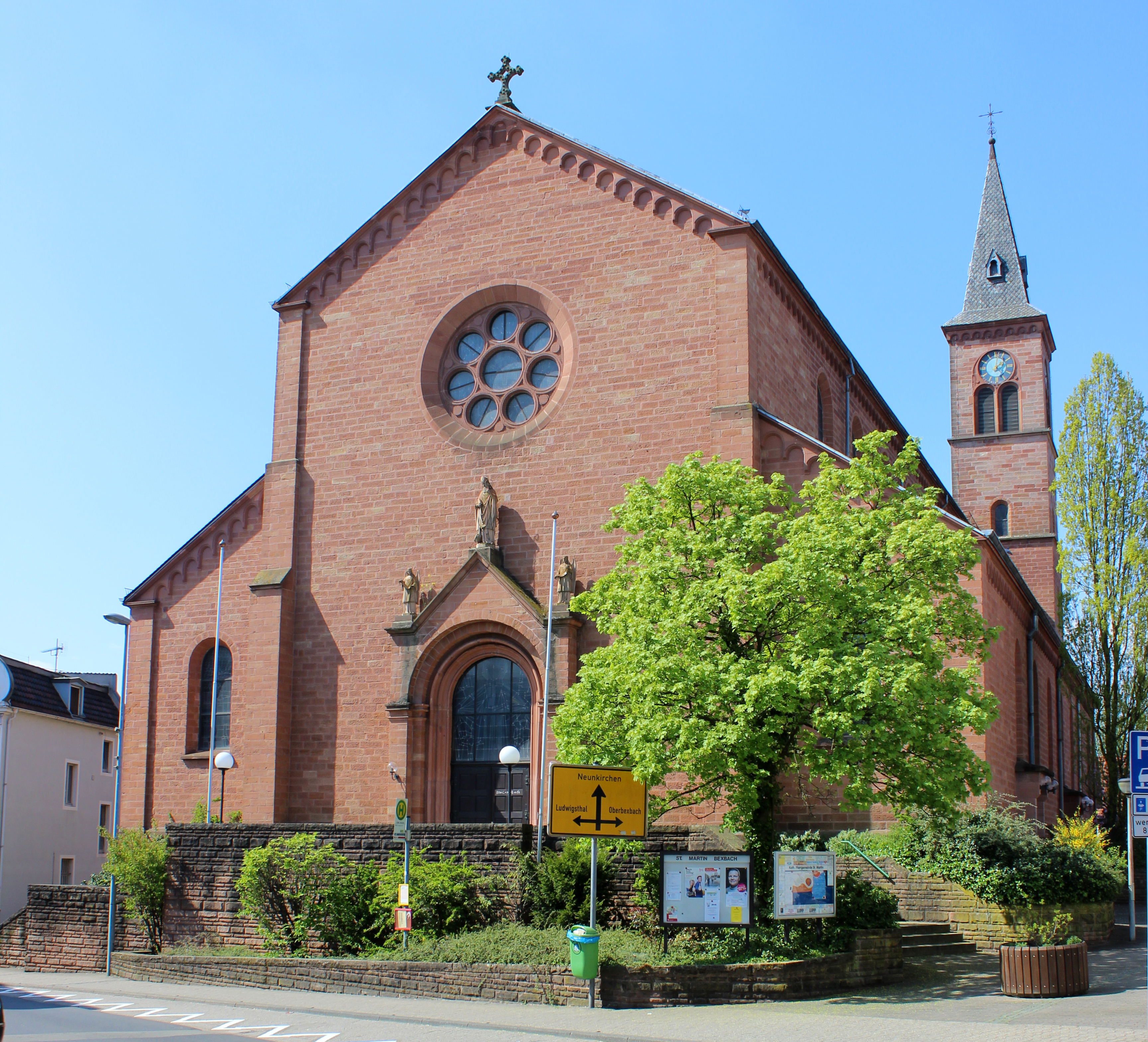 Die katholische Pfarrkirche St. Martin in Bexbach, Saarpfalz-Kreis, Saarland